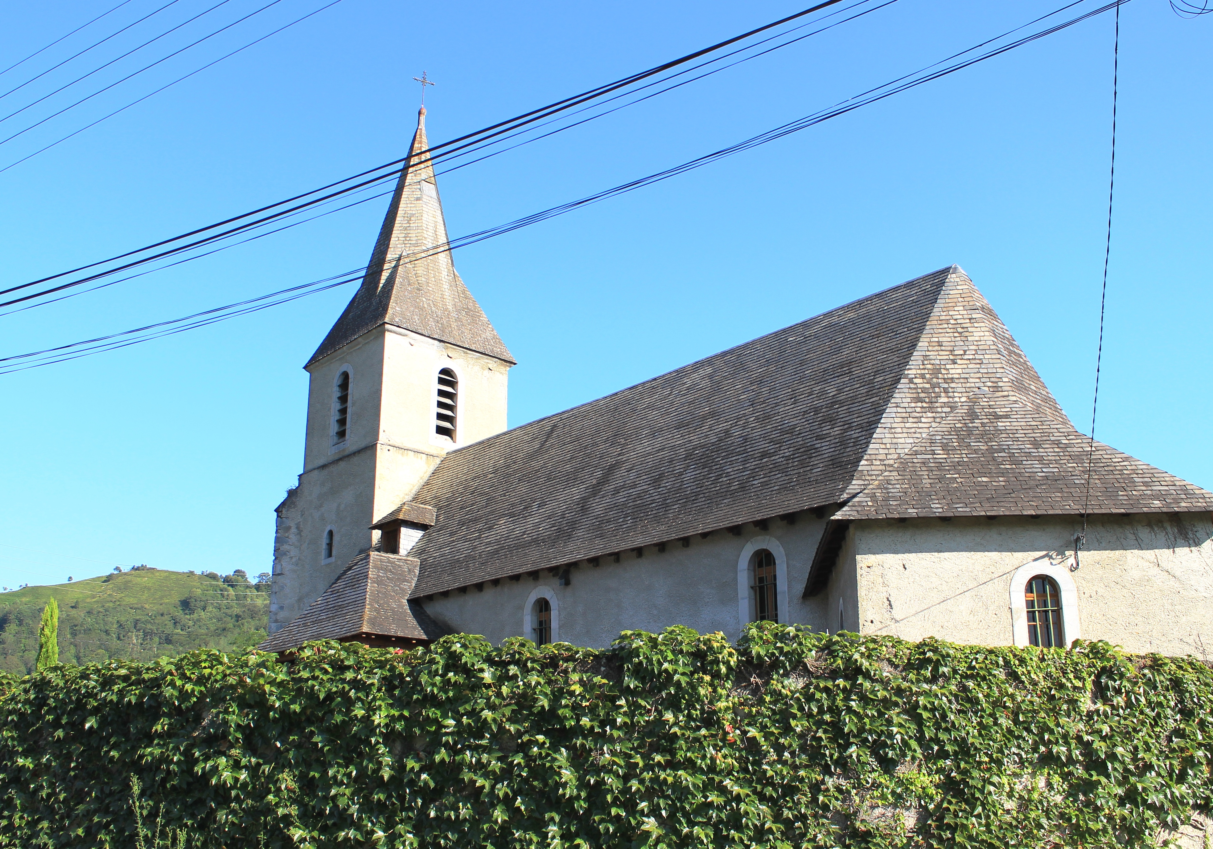 Église de l’Assomption de Marsas (Hautes-Pyrénées)